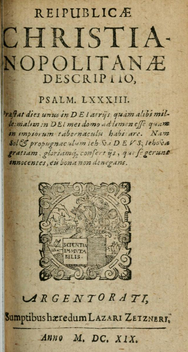 Titelblatt von Johann Valentin Andreaes Reipublicae Christianopolitanae descriptio. Argentorati 1619